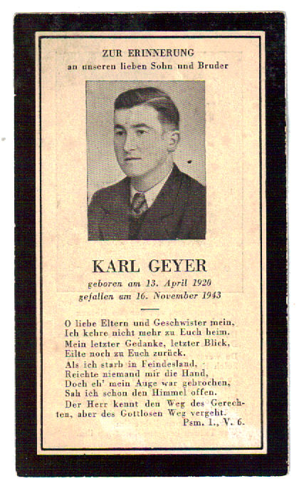 Carte souvenir du décès de Charles Geyer (1920-1943), enrôlé de force dans la Wehrmacht (carte 1 recto).